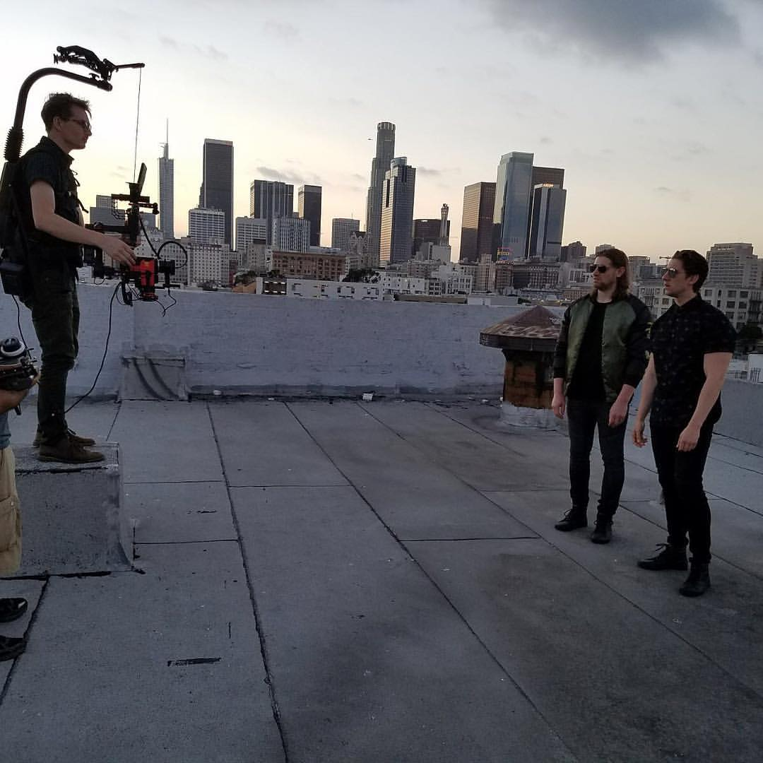 Martin Brothers Videodreh in Los Angeles für den Song "Find Another Love"